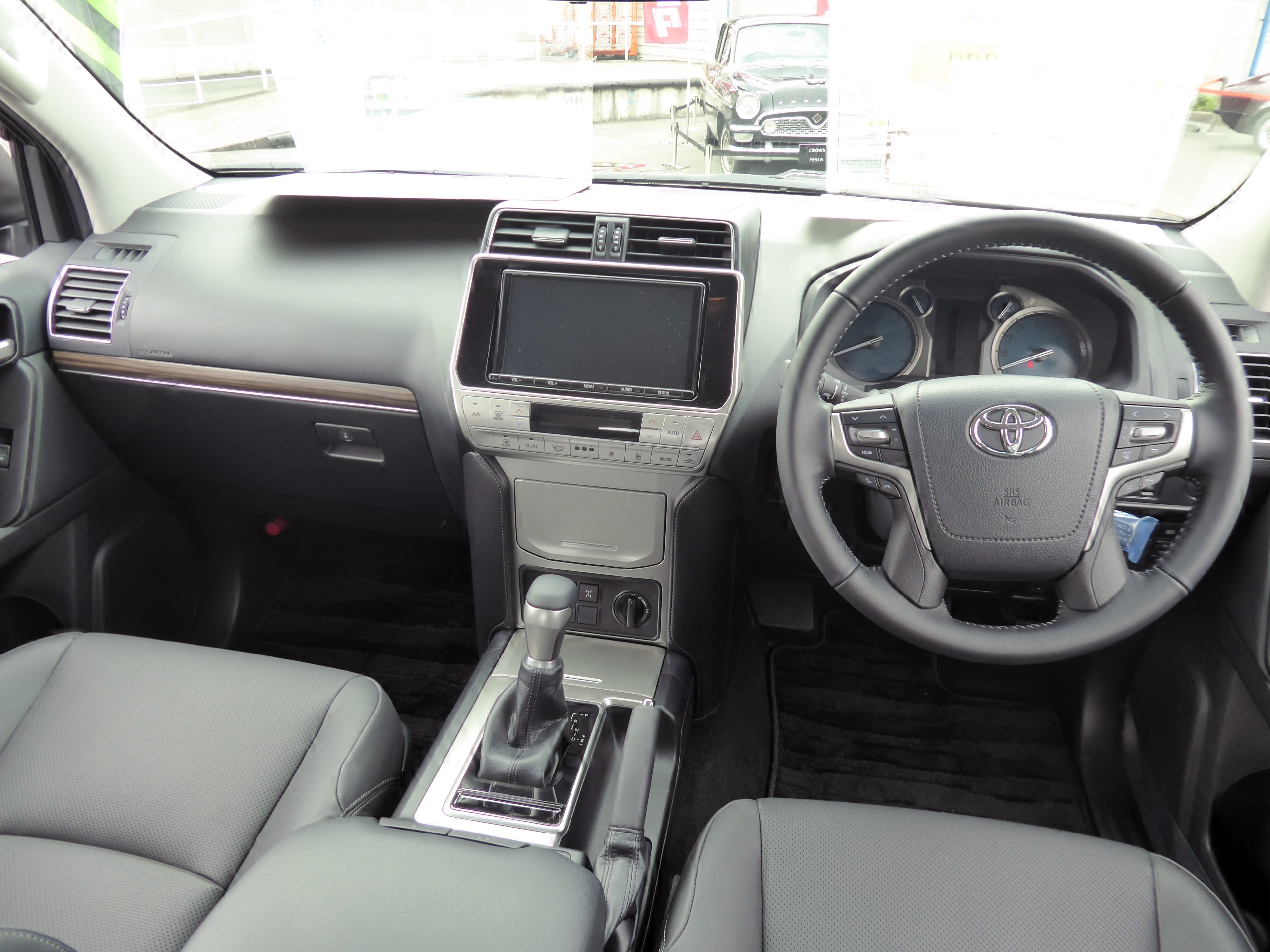 LDA-GDJ150W-GKTEY型トヨタ・ランドクルーザープラドTX"L Package"のインテリアを撮影。